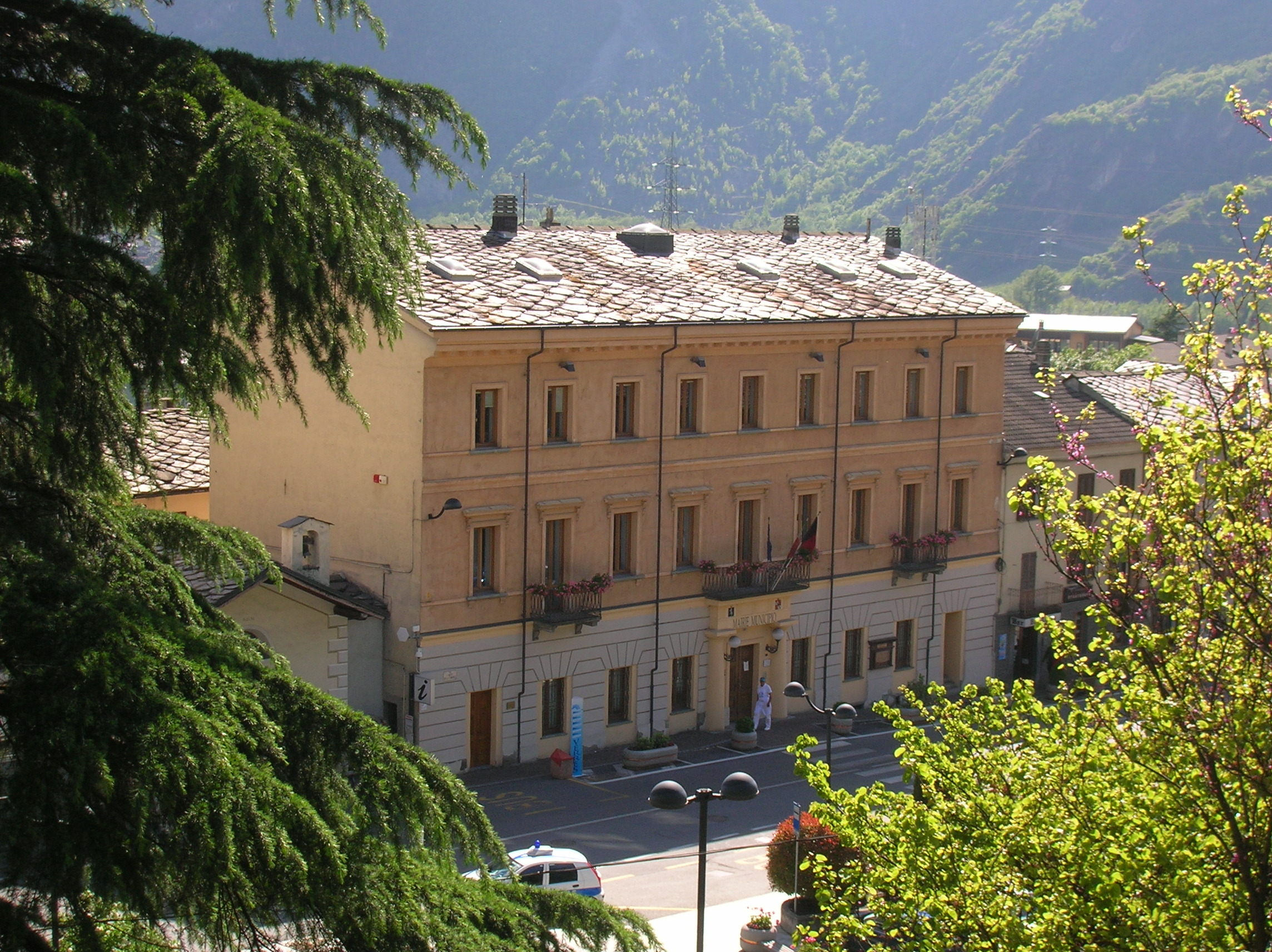 Municipio di Verrès, Valle d'Aosta, Italia.